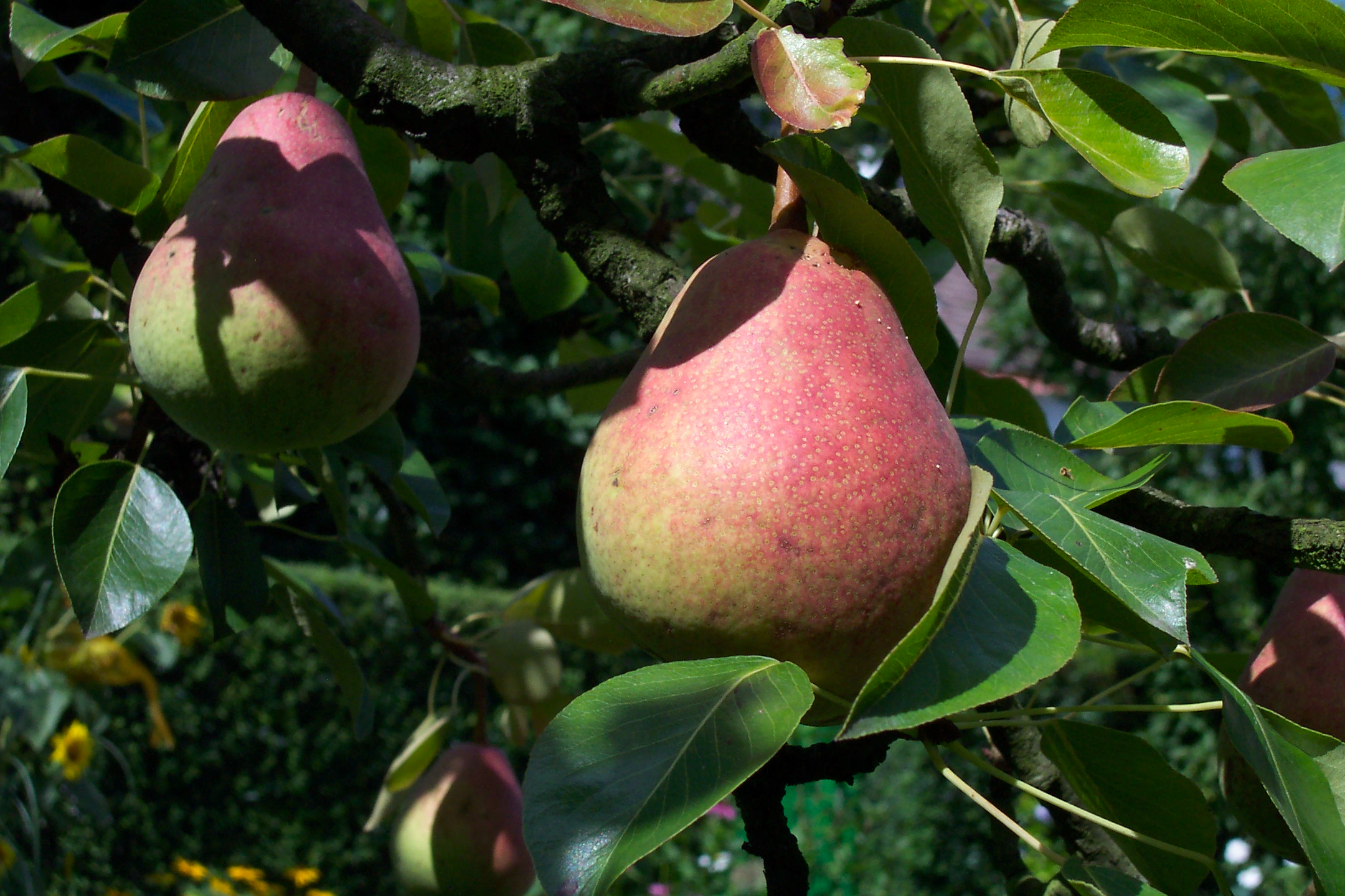 Genus Pyrus